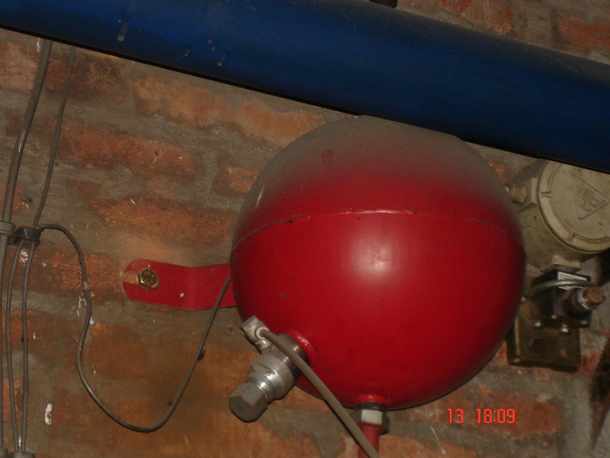 Ekspanzijska posuda, dio sigurnosne opreme toplovodnih sustava centralnog grijanja čija je osnovna namjena preuzimanje toplinskih rastezanja vode zbog promjena njezine temperature